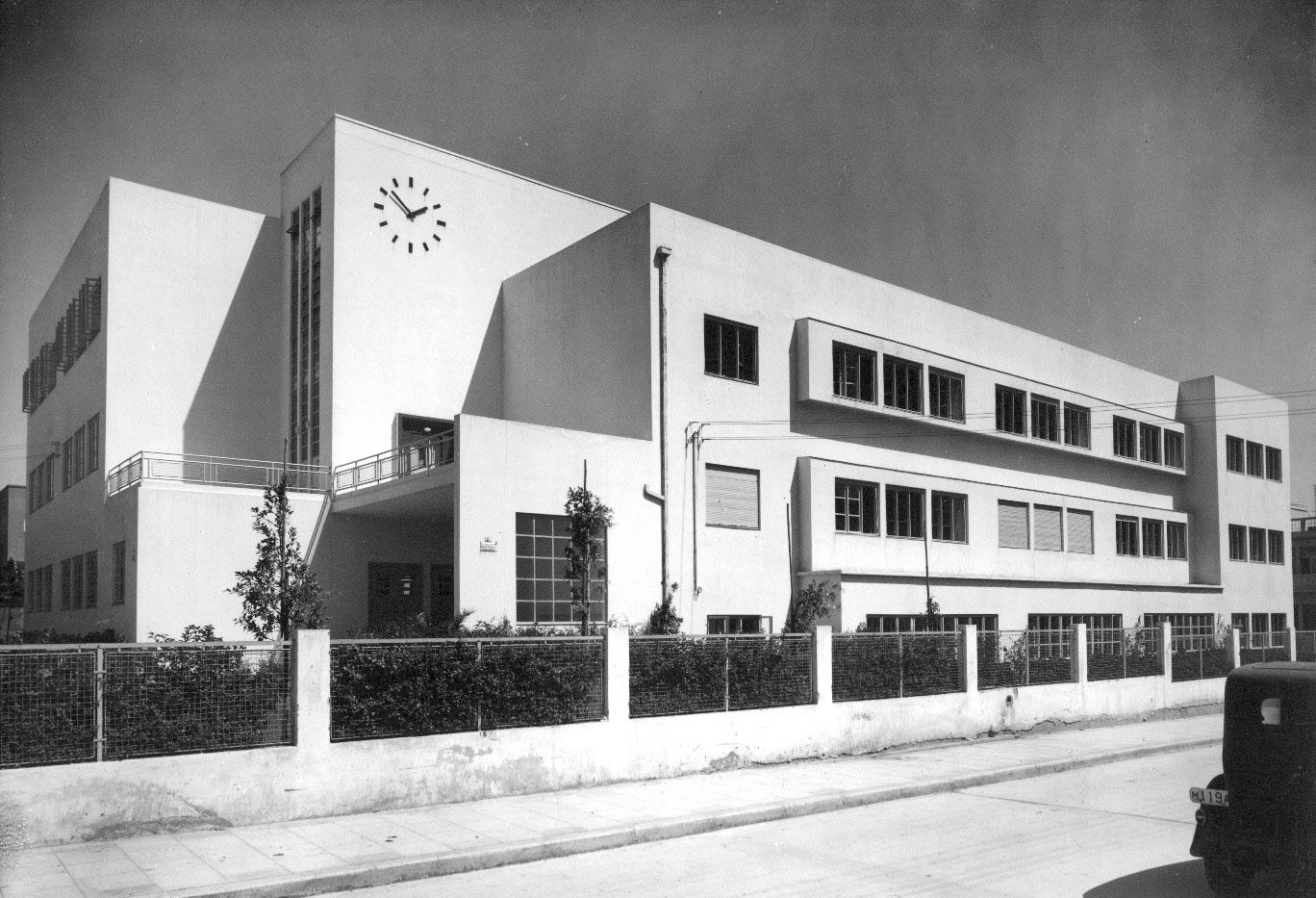 בית הספר בלפור